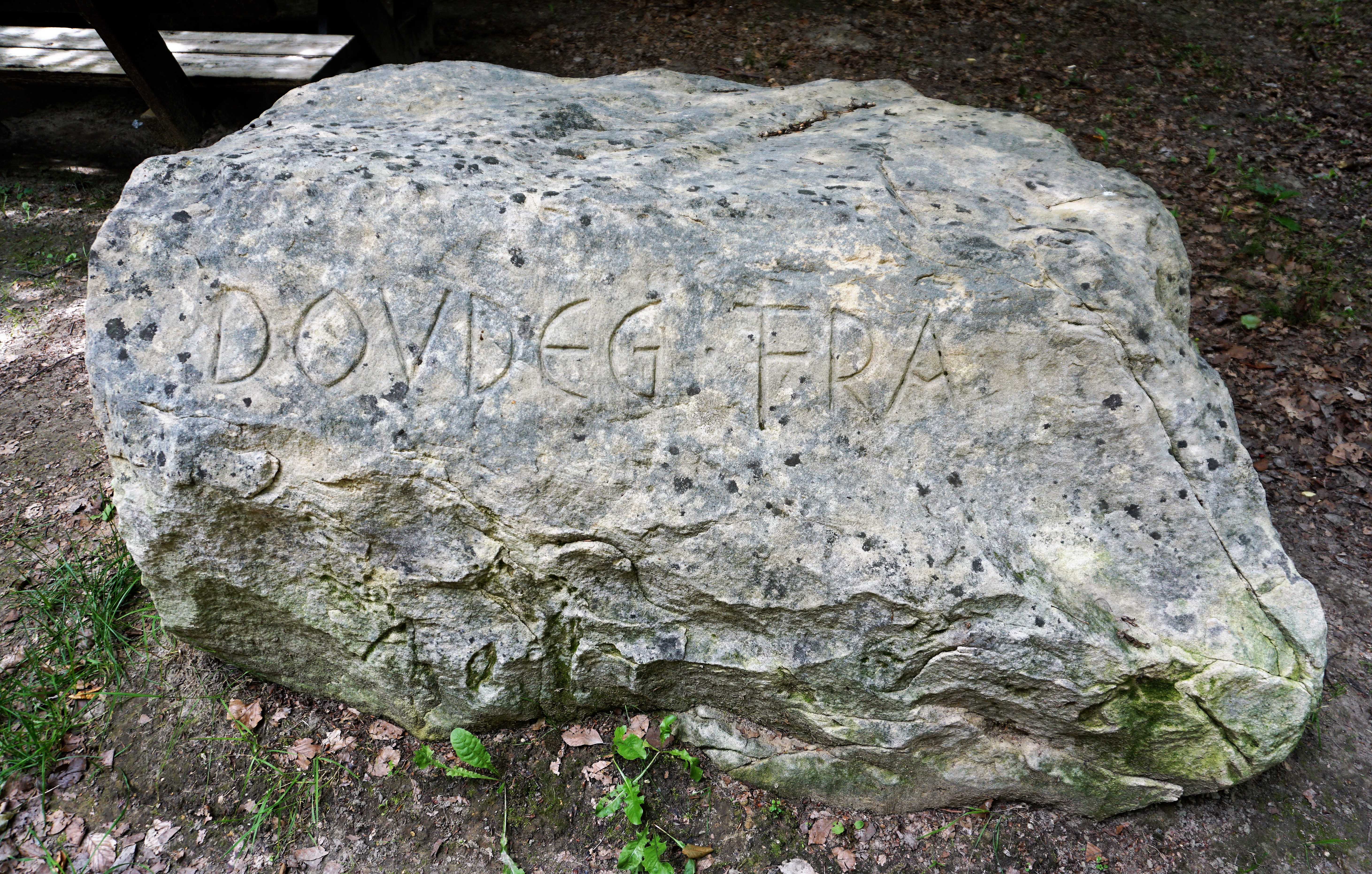 Luxembourg, lieu-dit "Doudeg Fra" (Femme morte). Pierre engravée.